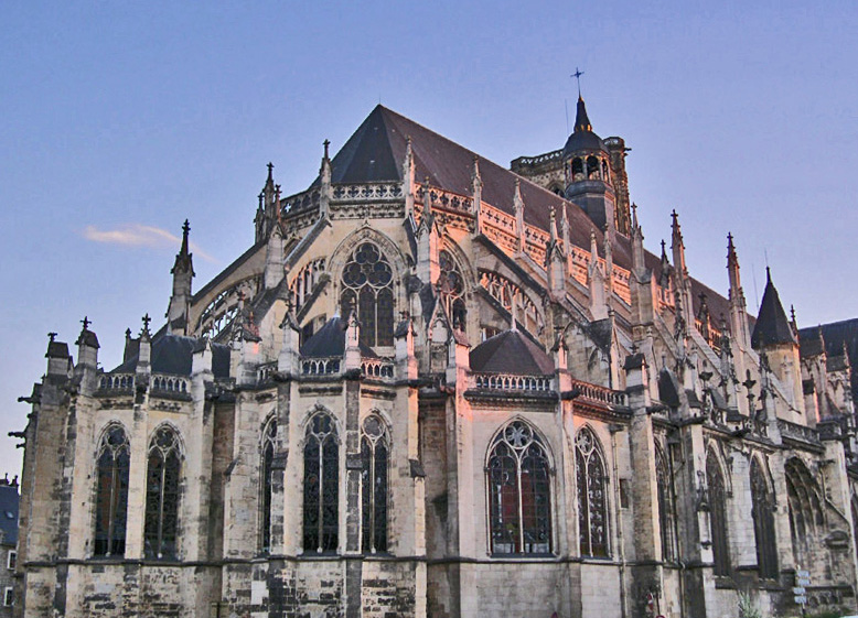 Nevers, Cathedrale, Chevet